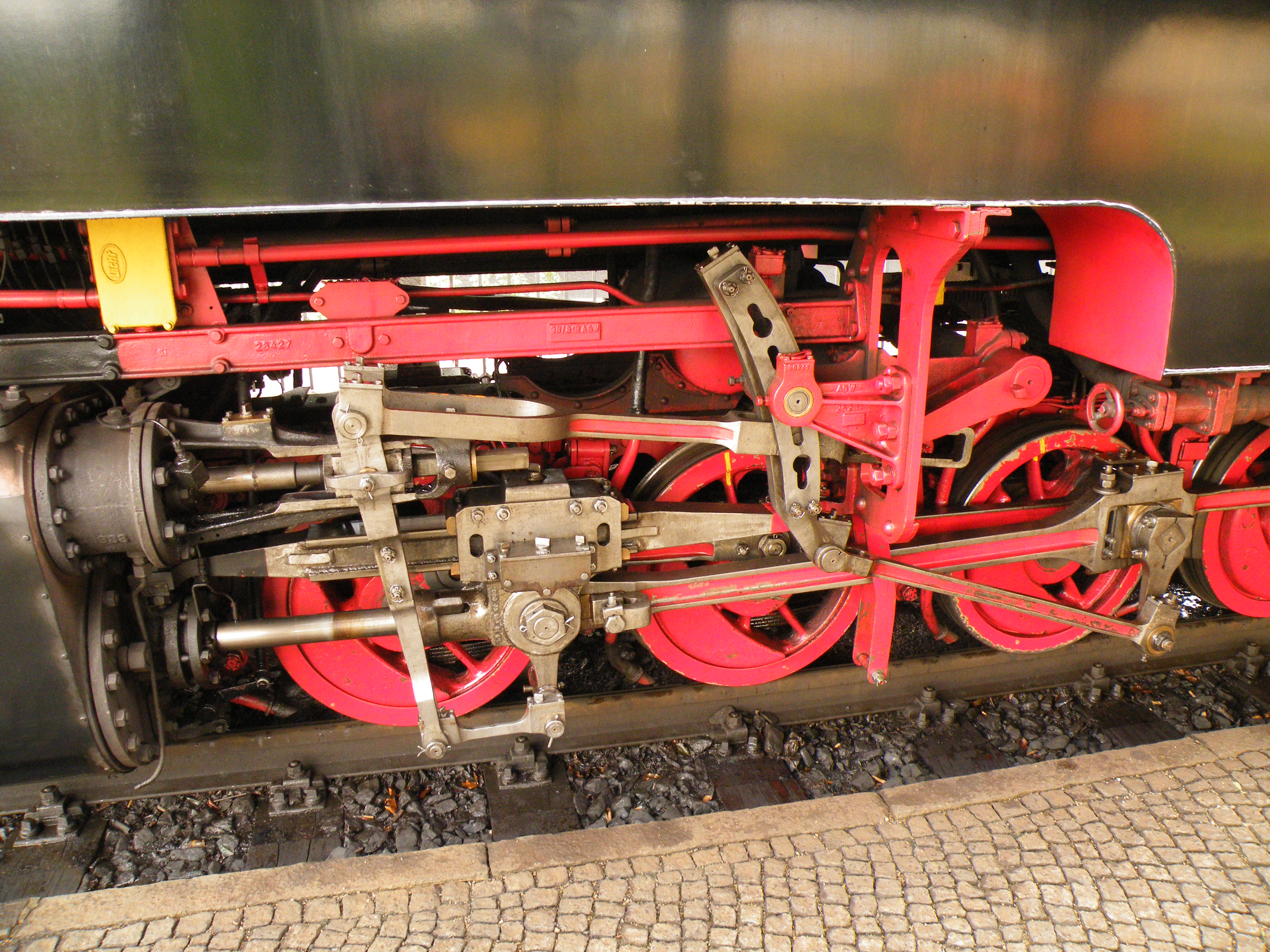 Wiązary serii 99 758 DRG